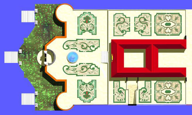 Schloss Hof, 2.bis 4. Terrasse-Rekonstruktion